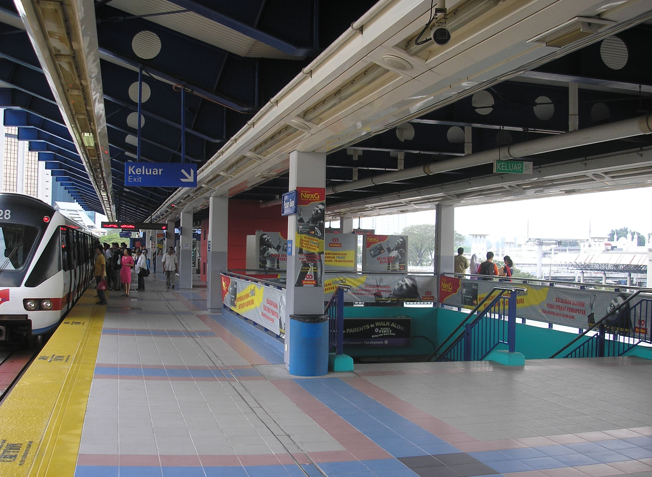 The Pasar Seni LRT station (Kelana Jaya Line), Kuala Lumpur, Malaysia.